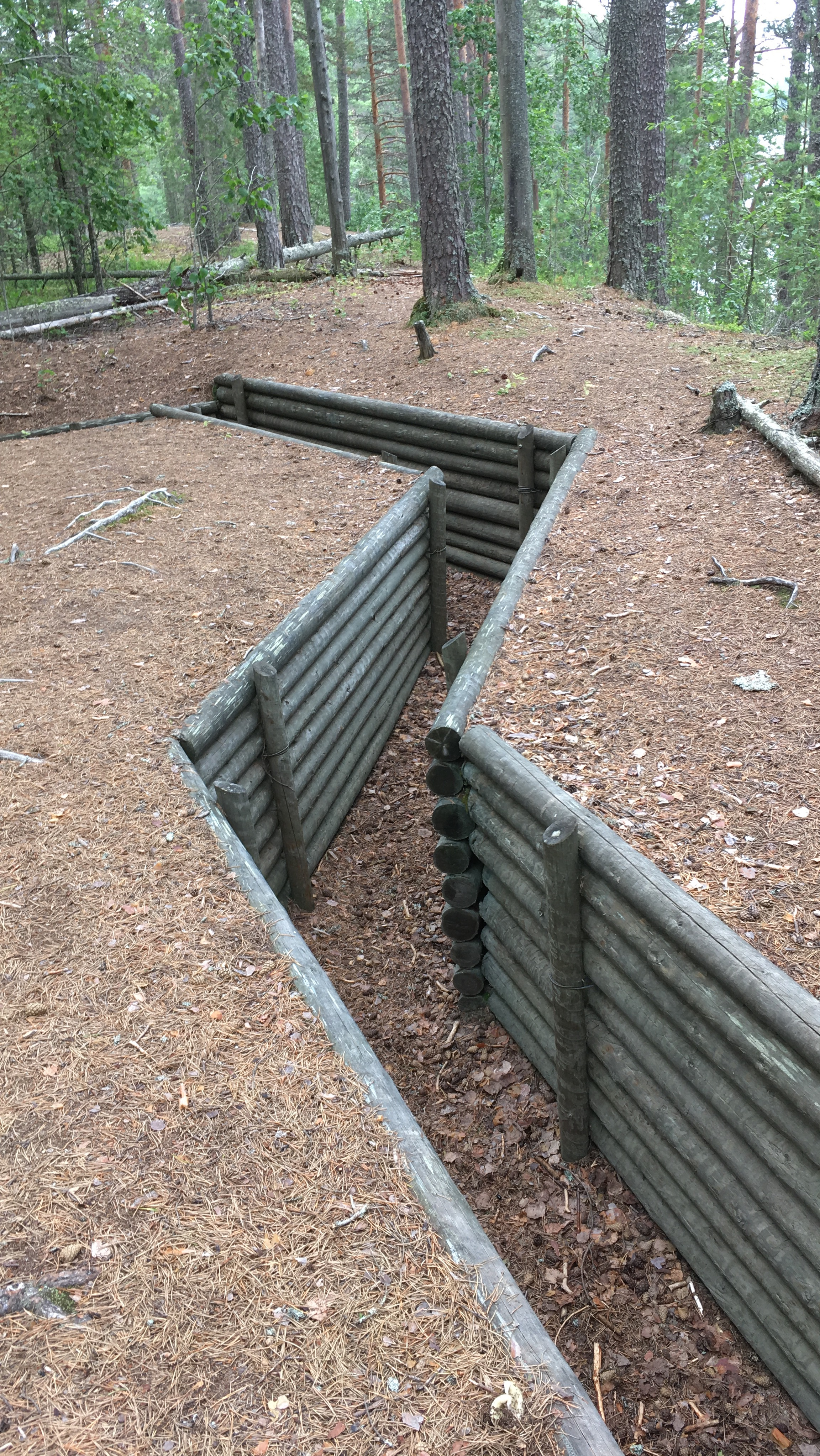 Juoksuhauta Petkeljärven kansallispuistossa.